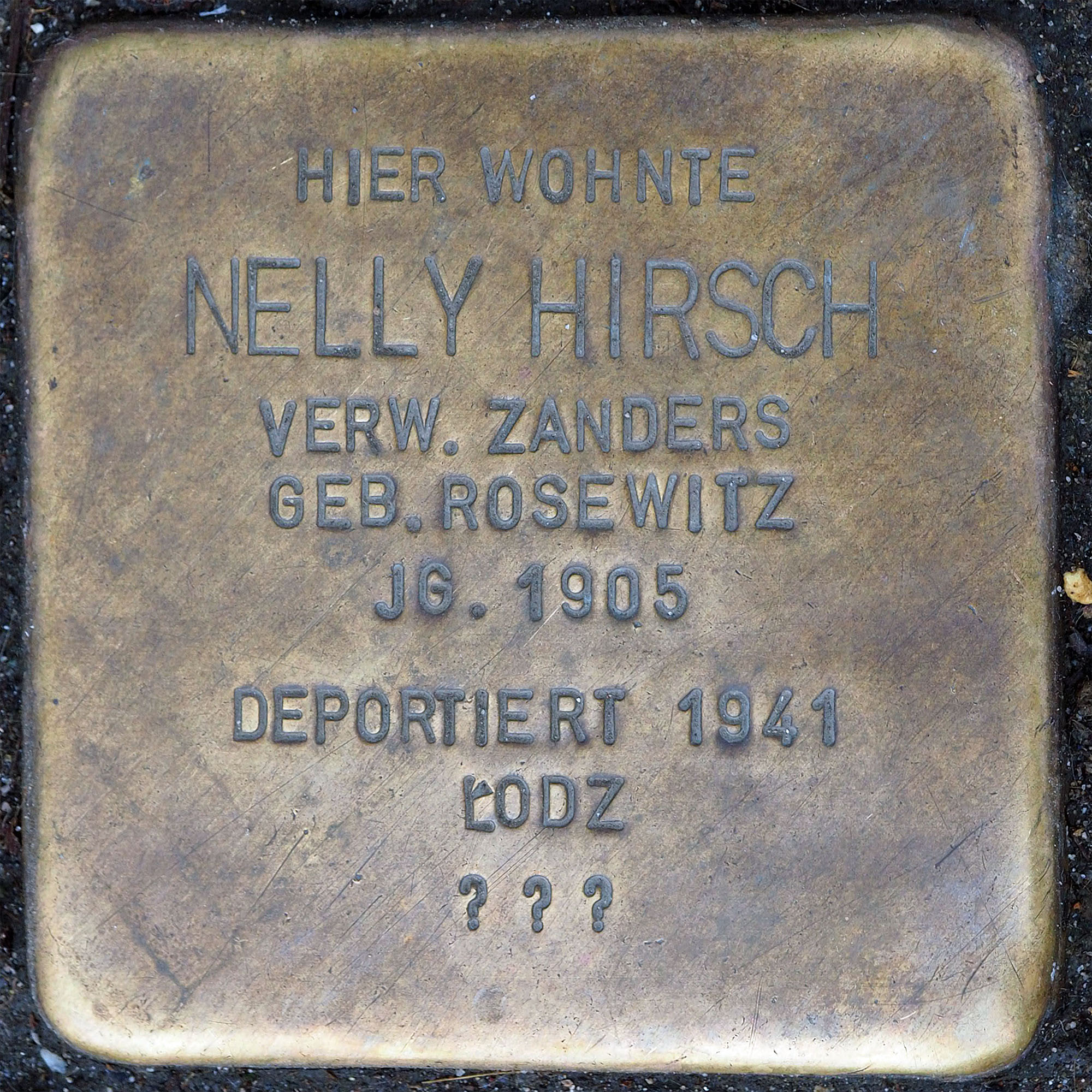 Stolpersteine MG: Hirsch, Nelly